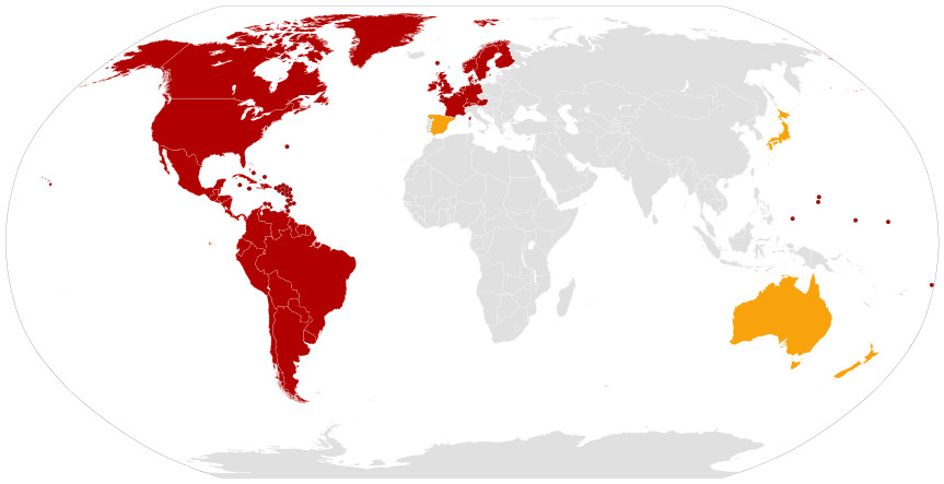 Cobertura de Netflix, desde marzo 2015